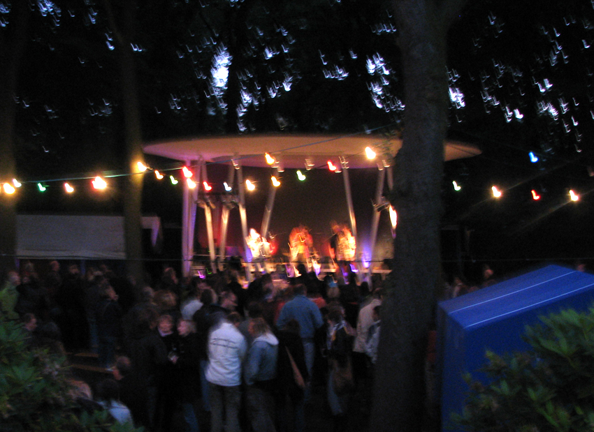 Wilde Töne – Festival für Folk- und Weltmusik. Open Air Konzert auf der Bühne "Stadtpark-Restaurant"